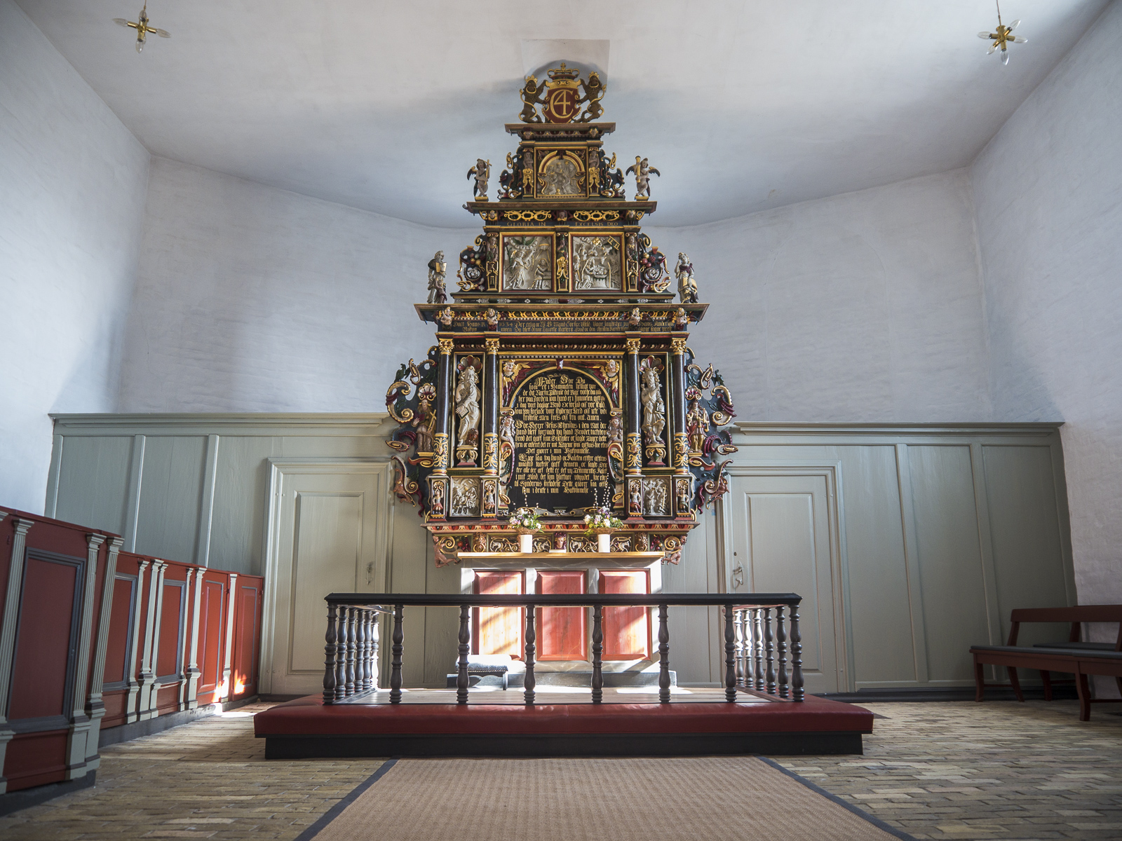 Fanefjord Kirke